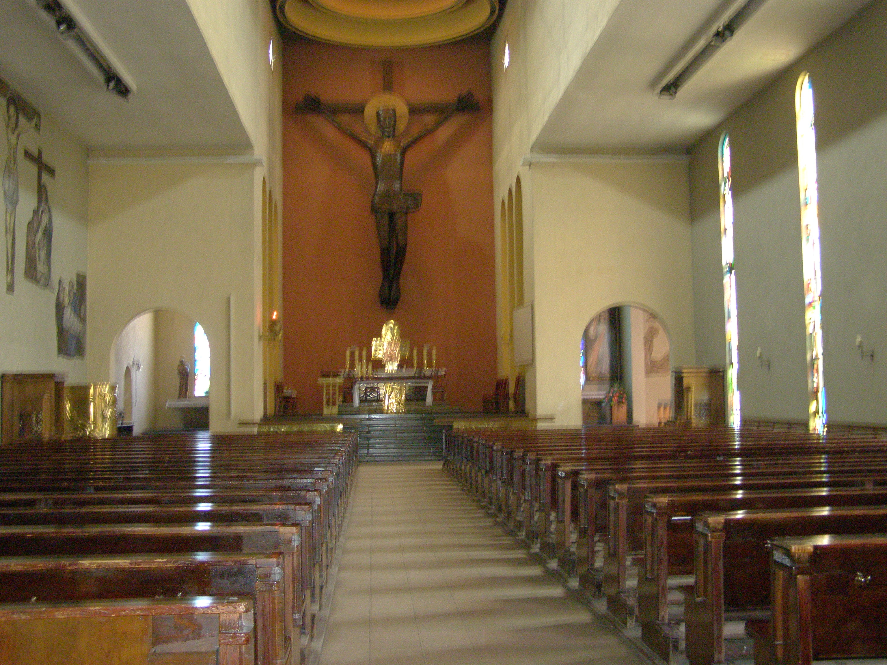 Wnętrze kościoła p.w. św. Antoniego w Pile